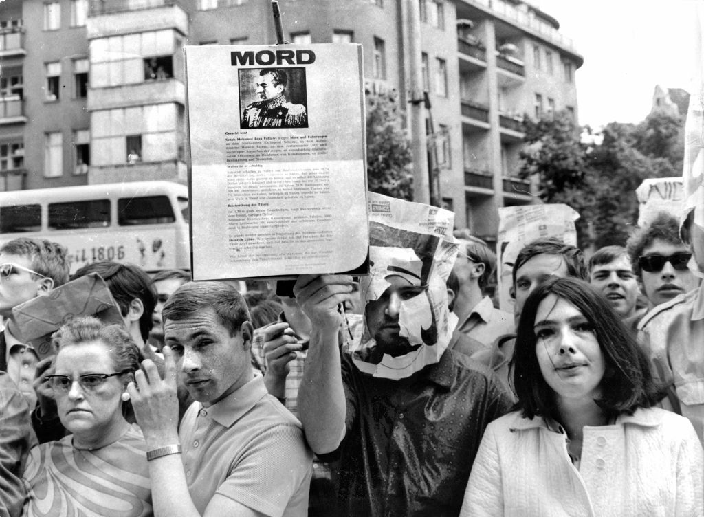 Ludwig Binder: Studentenrevolte 1967/68, West-Berlin; veröffentlicht vom Haus der Geschichte der Bundesrepublik Deutschland